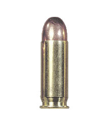 .38 Super cartridge